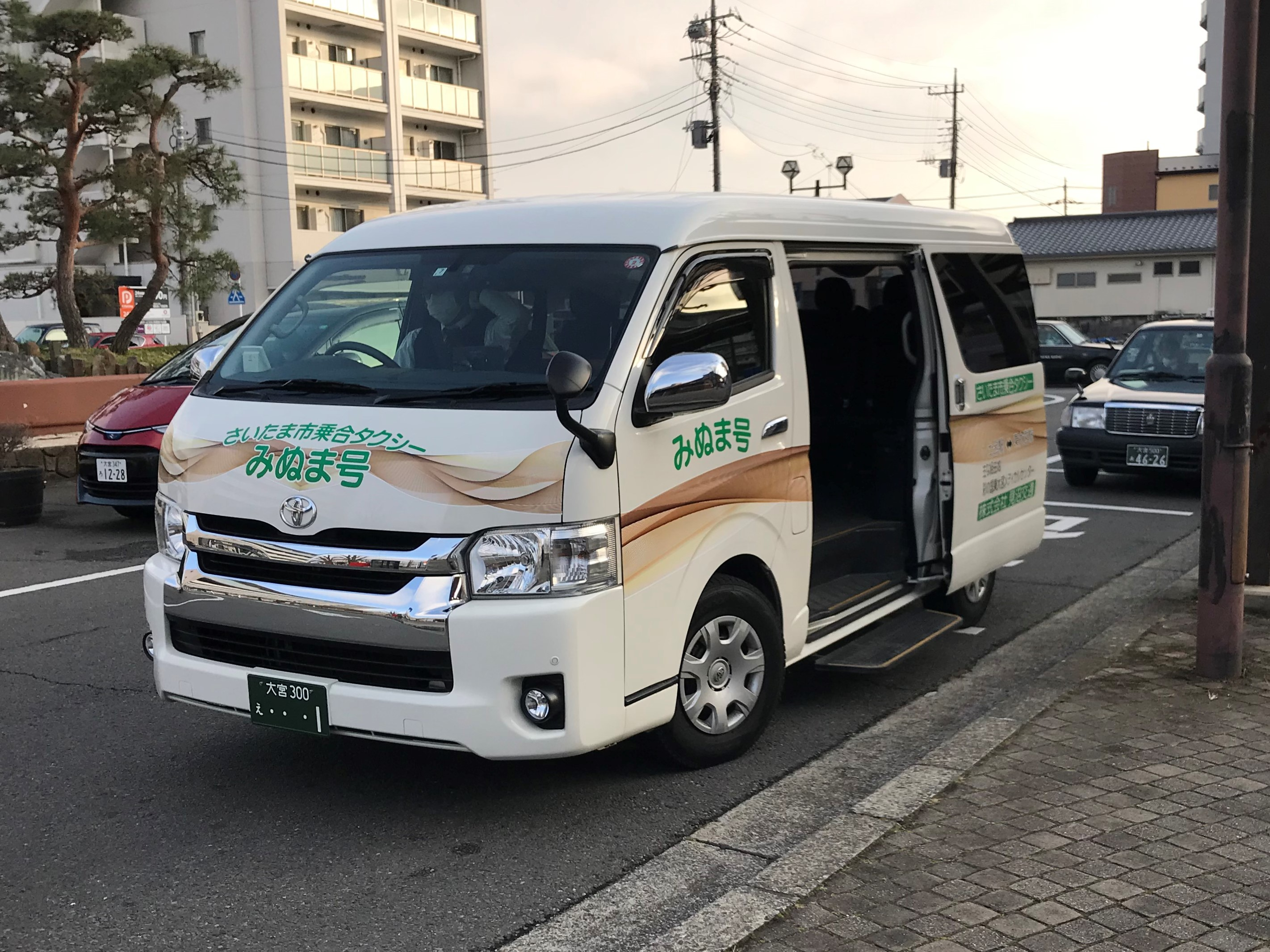 さいたま市見沼区大砂土東地区乗合タクシー「みぬま号」を撮影しました。